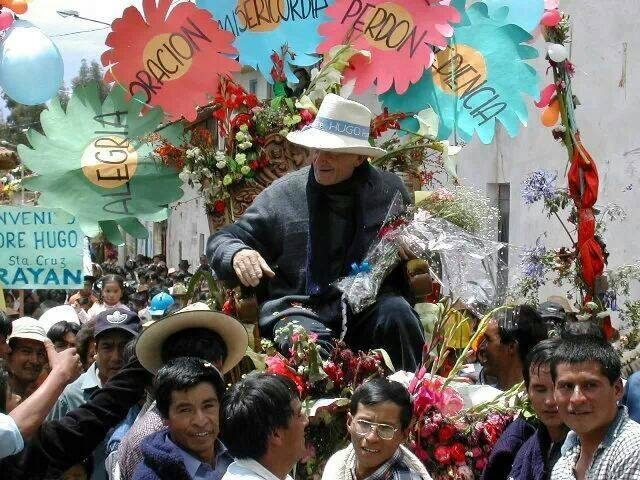 Luego de una larga estadía en Italia por su tratamiento cardíaco, el padre Ugo retornó a Chacas en 2007 y los pobladores lo cargaron en andas por las calles principales de Chacas.